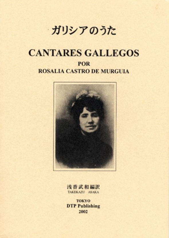 Cantares gallegos por Rosalía Castro de Murguía